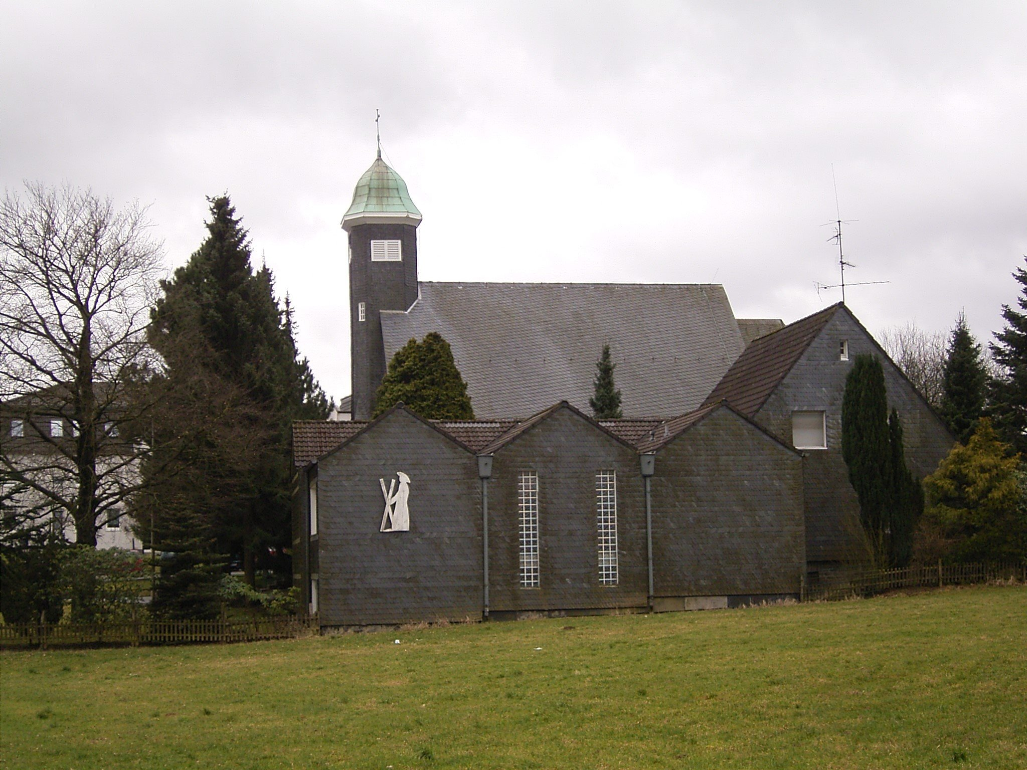 Sankt Andreas in Remscheid - Bergisch Born